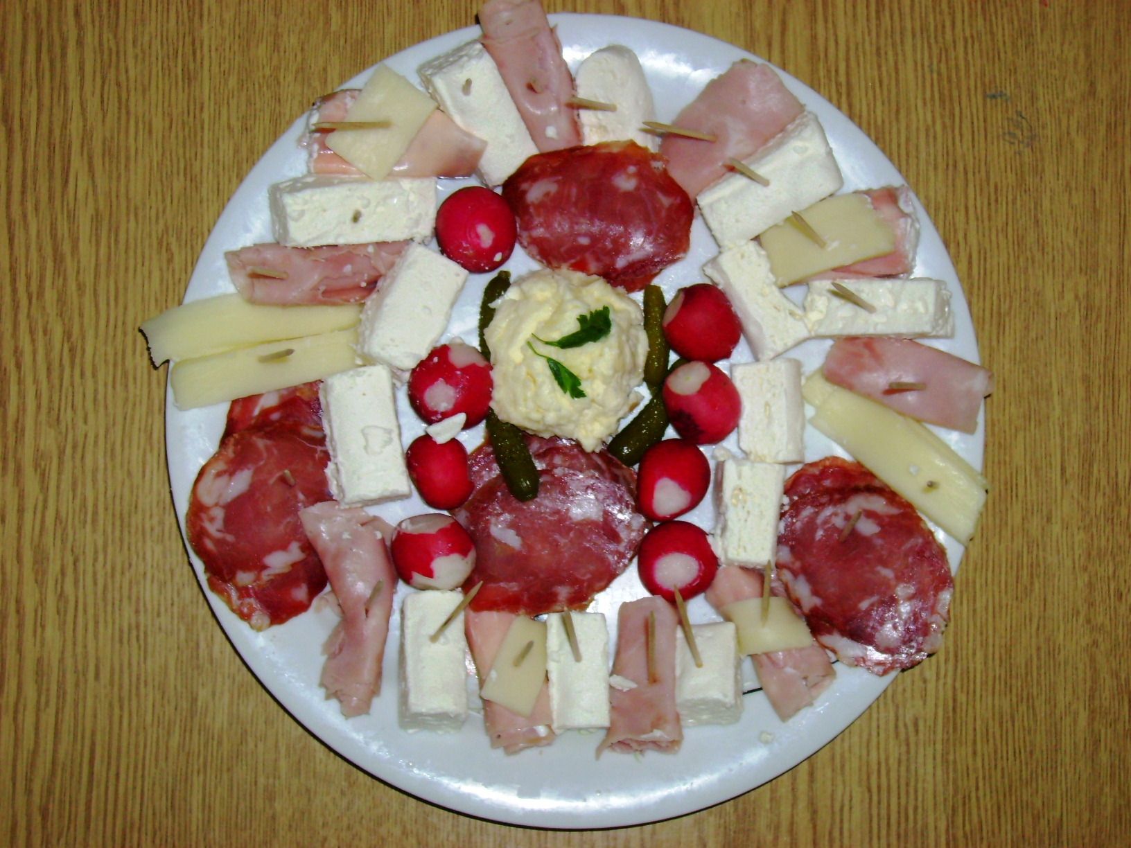 Српско предјело